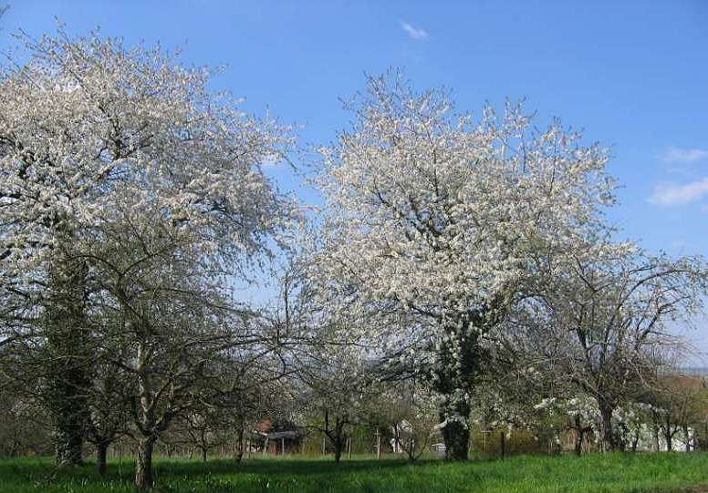 Streuobstwiese im Frühling Streuobstwiese in Freiberg am Neckar, Gewann Klinge.